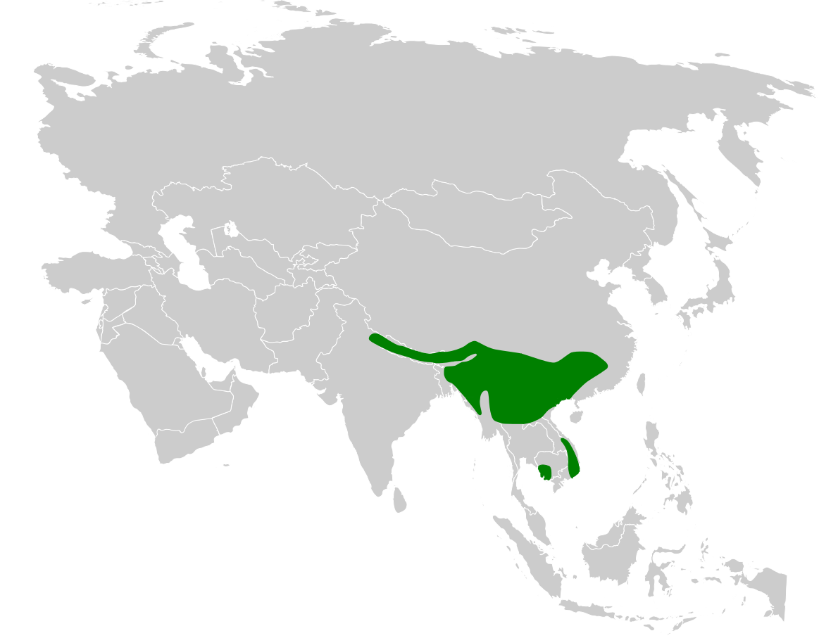 Tesia cyaniventer distribution map, based on